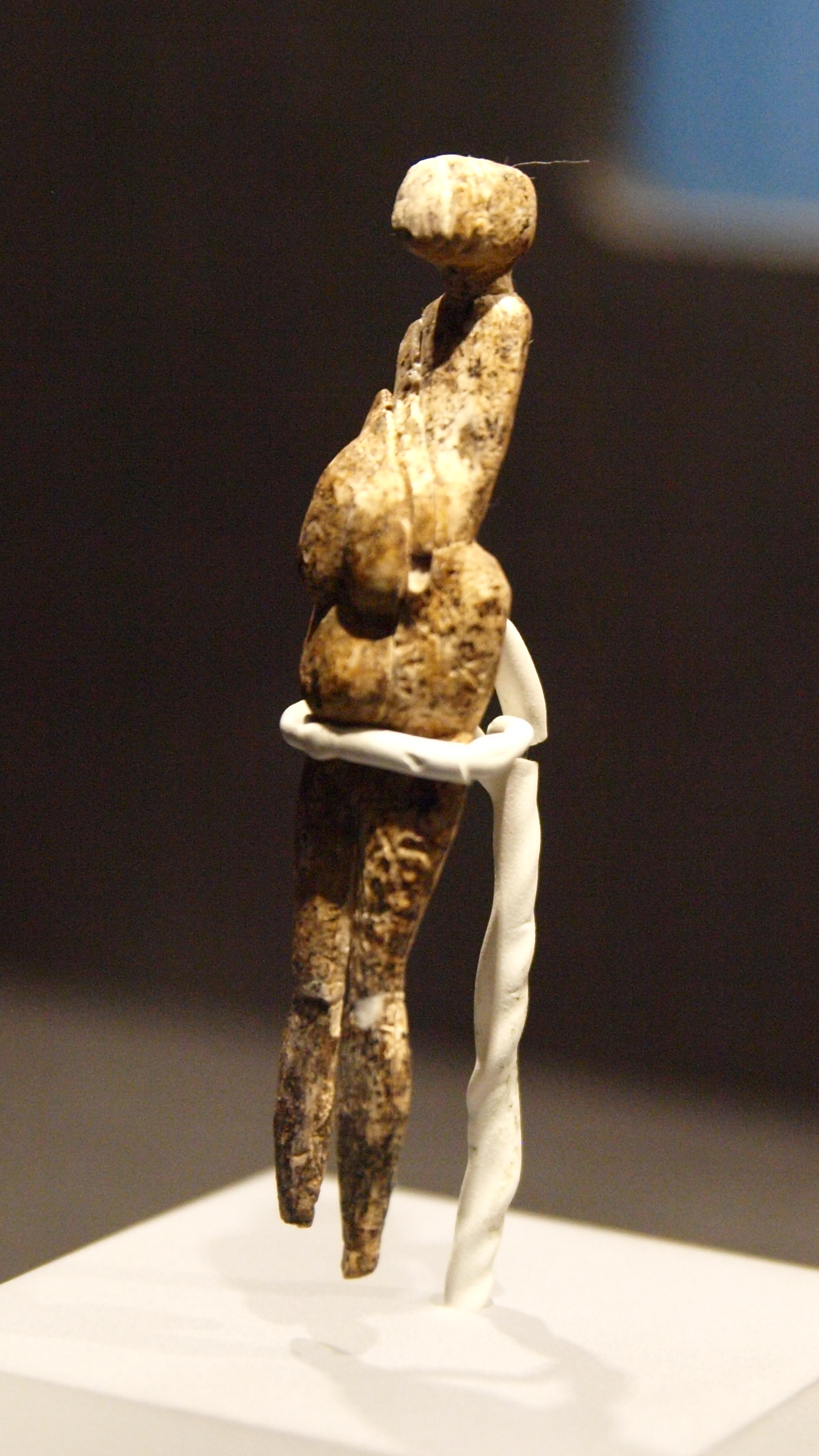 Frauenstatuette von Gagarino, Mammutelfenbein, Gravettien ca. 23.000 BP, Original, ausgestellt im Archäologischen Museum Hamburg (Eiszeiten - Die Kunst der Mammutjäger vom 18. Oktober 2016 bis 14. Mai 2017). Aufbewahrungsort sonst Kunstkammer Sankt Petersburg, Russland.